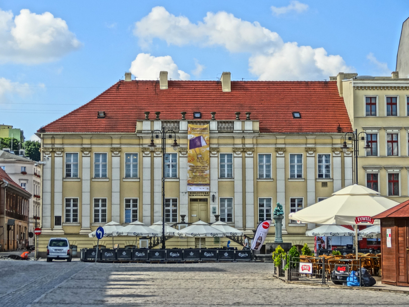 Wojewódzka i Miejska Biblioteka Publiczna w Bydgoszczy, budynek przy Starym Rynku